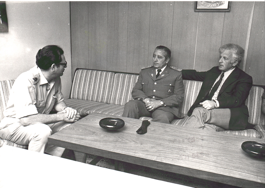 מאי 1974: ראש אמ"ן שלמה גזית מארח את רמטכ"ל צבא אקוודור.